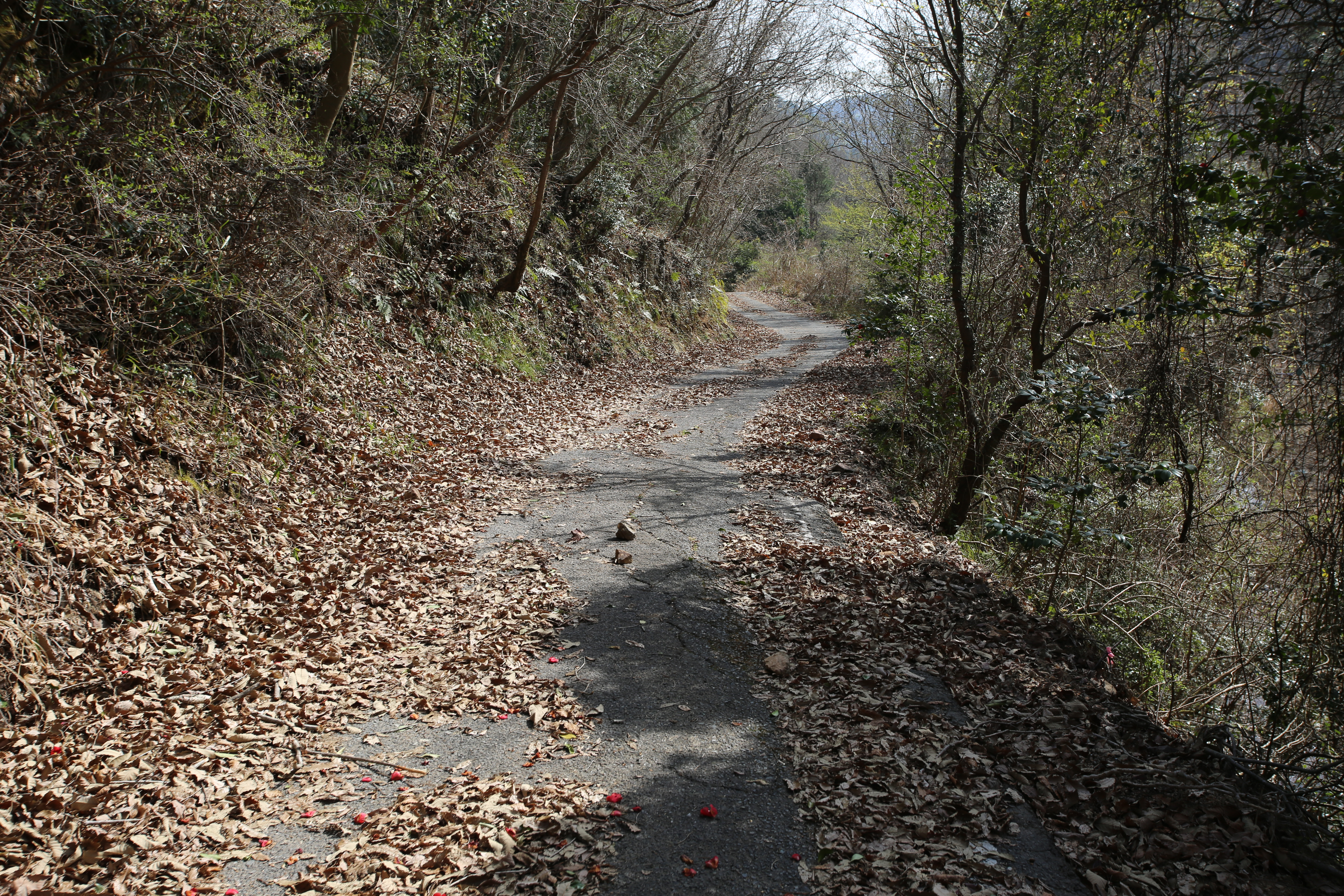 広島県道158号線。県道とは言え狭小路。本郷温泉地区を少し上った場所、峠まではまだ少しある。